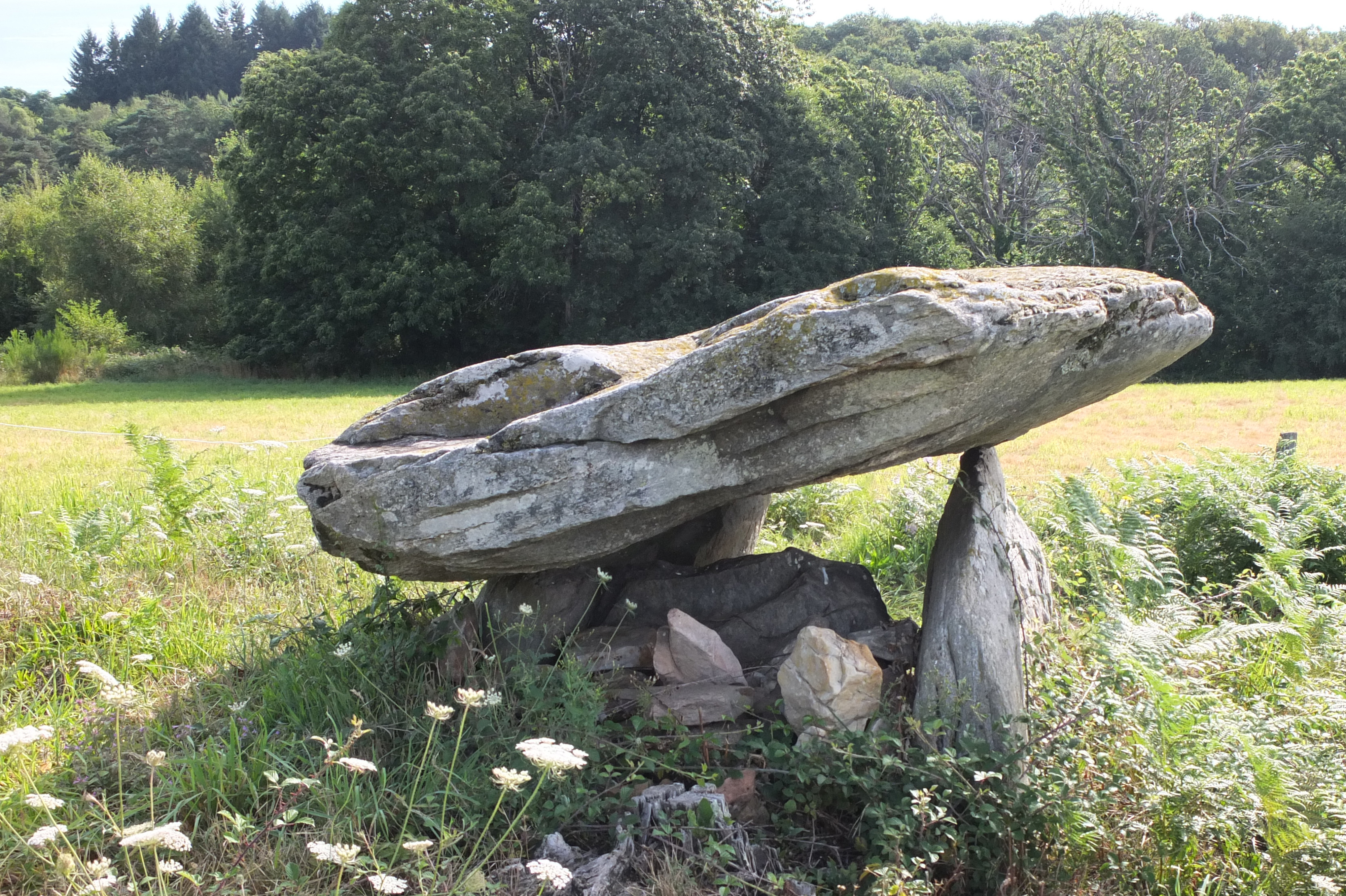 Cabane de la Fée, Brugeilles (Classé, 1910) .